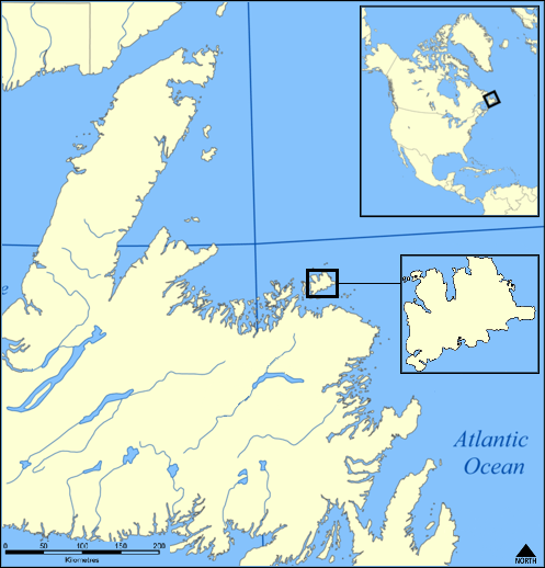 Isla de Fogo, Canada